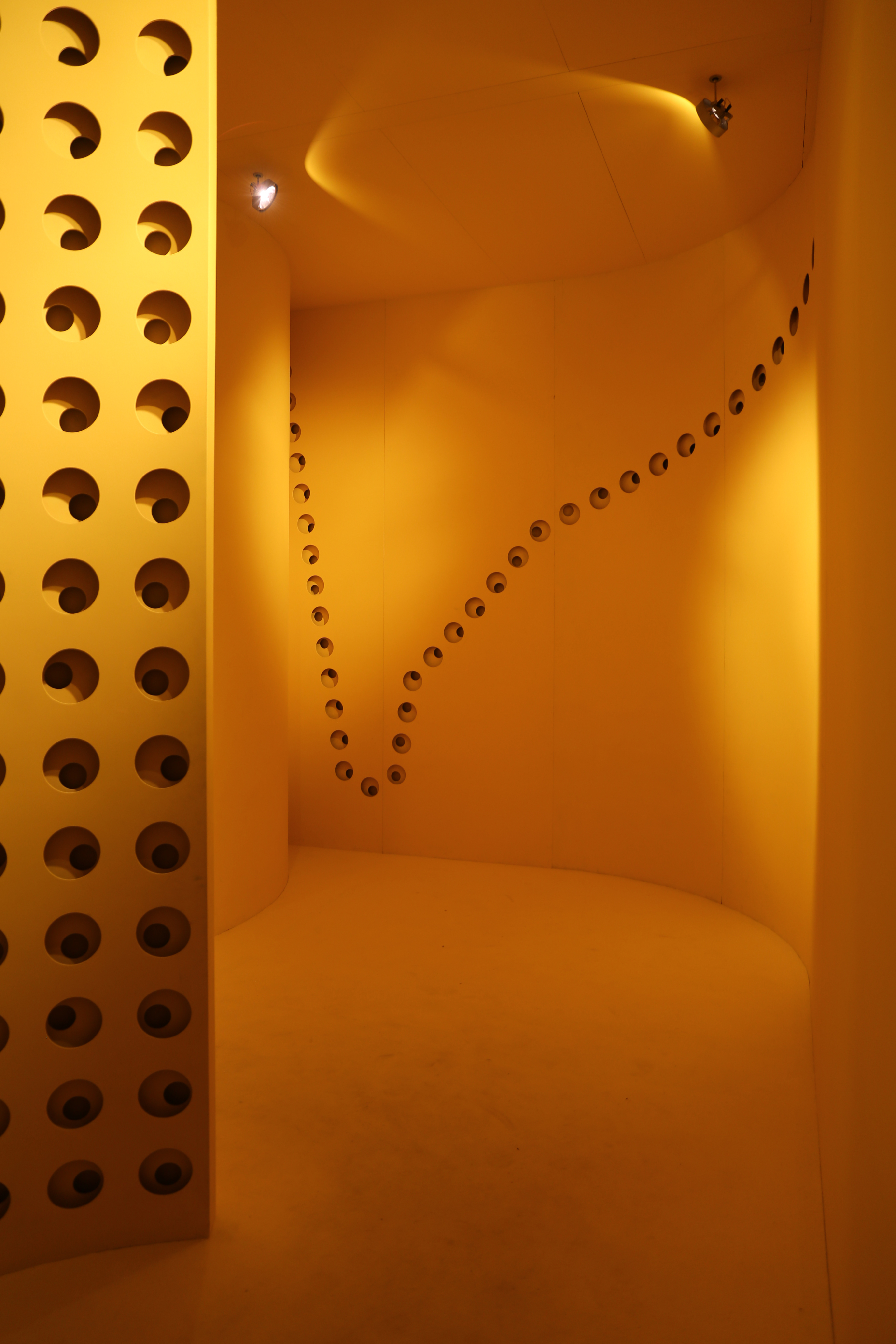 Centro per l'arte contemporanea Luigi Pecci This is a photo of a monument which is part of cultural heritage of Italy.